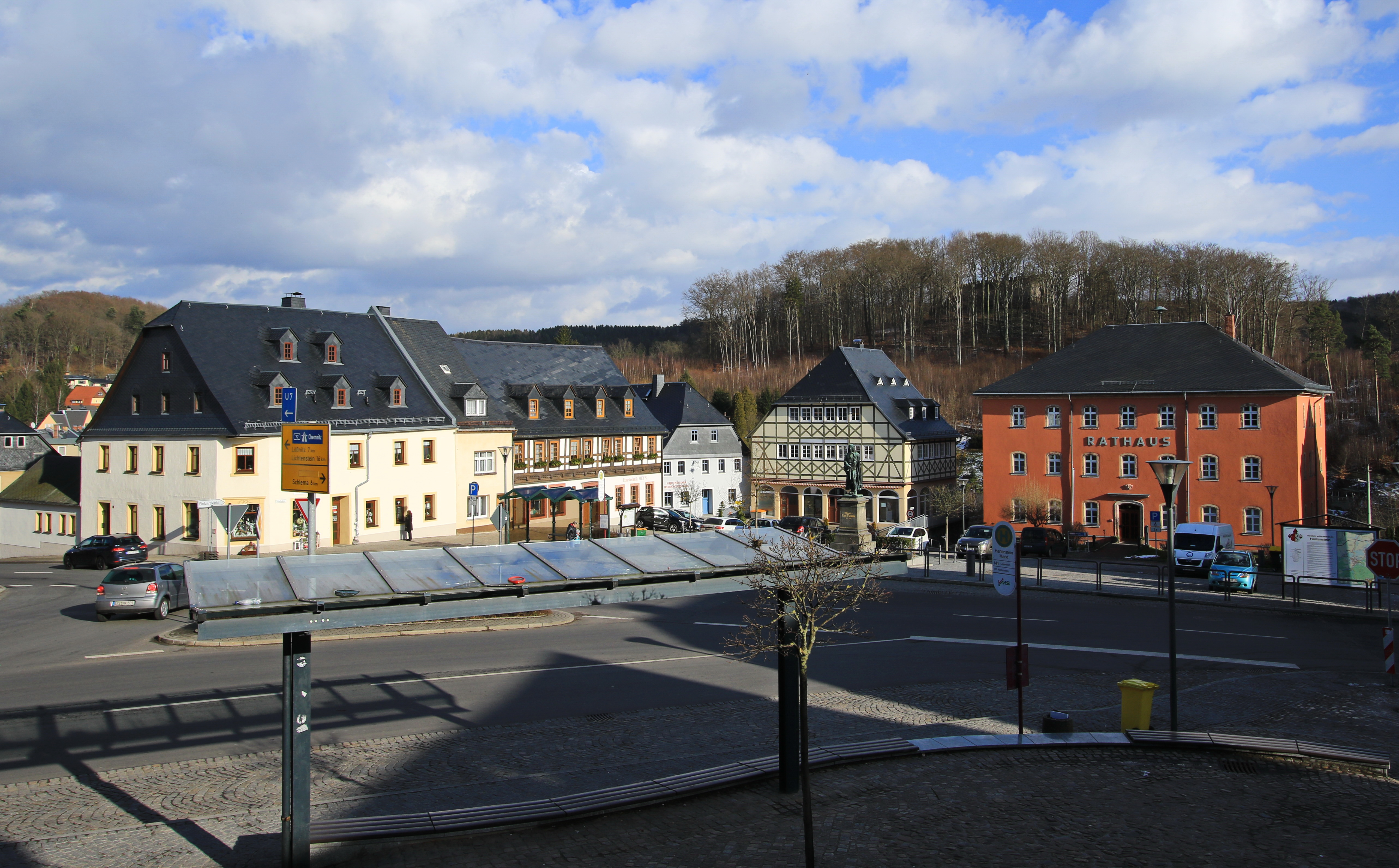 Hartenstein im Erzgebirge, Marktplatz